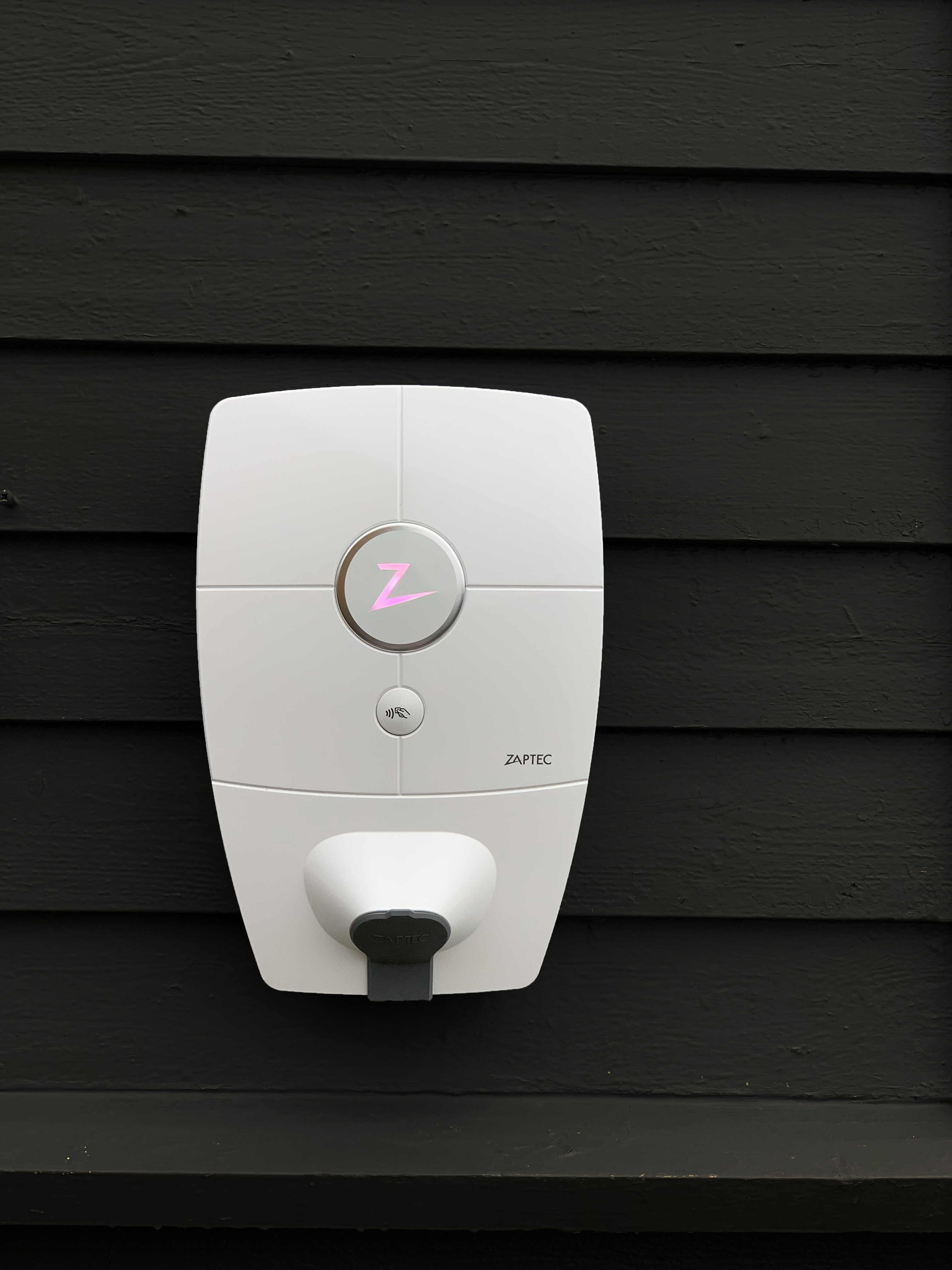 ZAPTEC Home hjemmelader